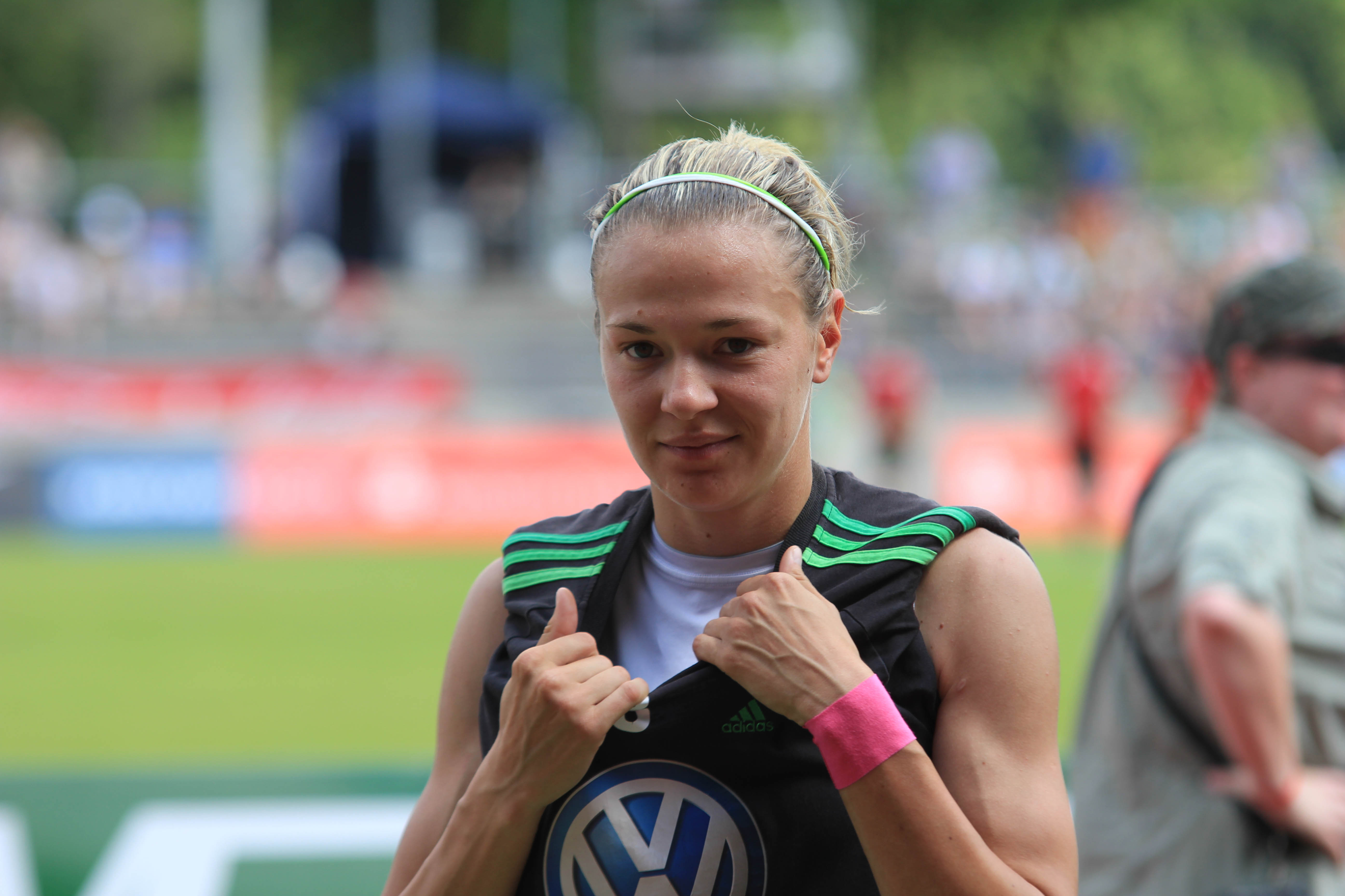 Hungarian footballer Zsanett Jakabfi, VfL Wolfsburg